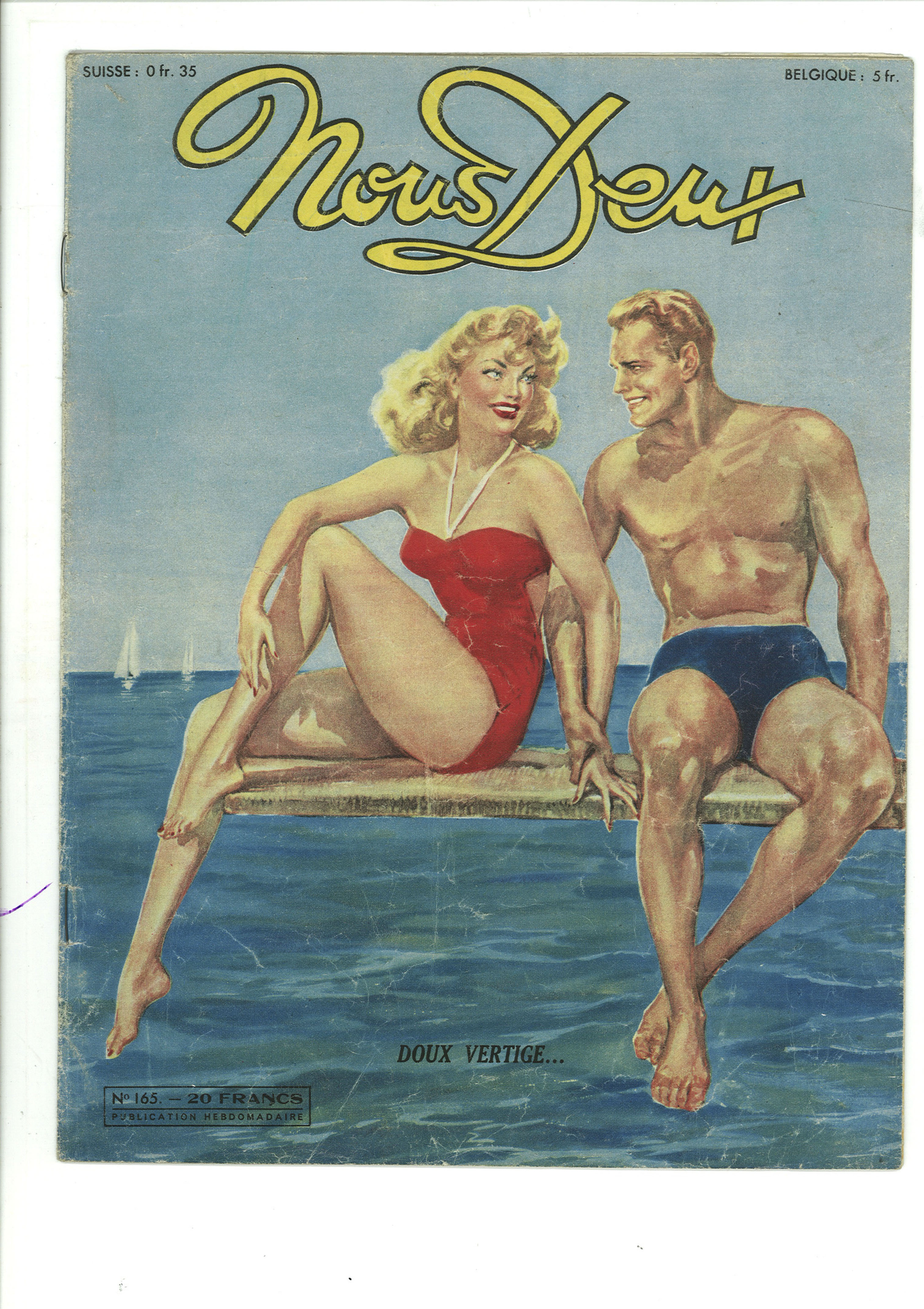 Couverture du magazine Nous Deux numéro 165